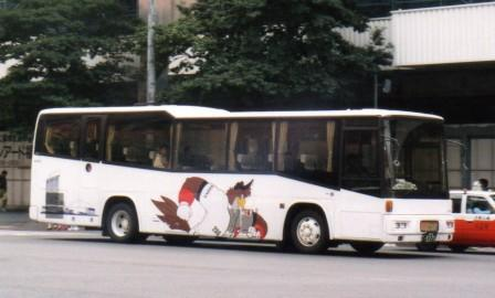 よかトピアのガイドウェイバスから転用された車両